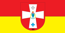 Прапор Рожищенського району